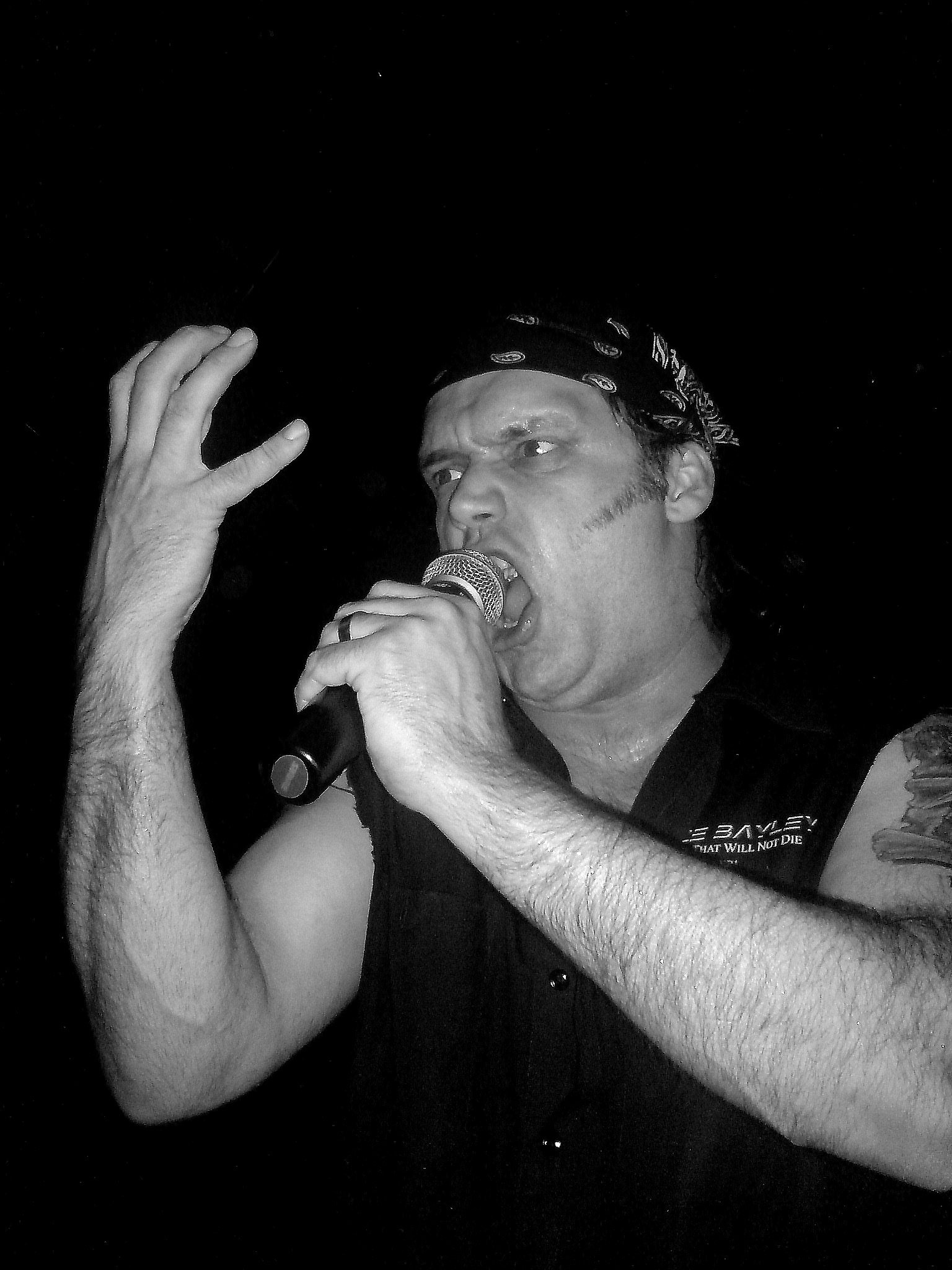 Det här är en bild från Blaze Bayleys spelning i Stockholm 2009.